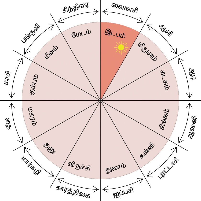 Drawn by the user who uploaded it.